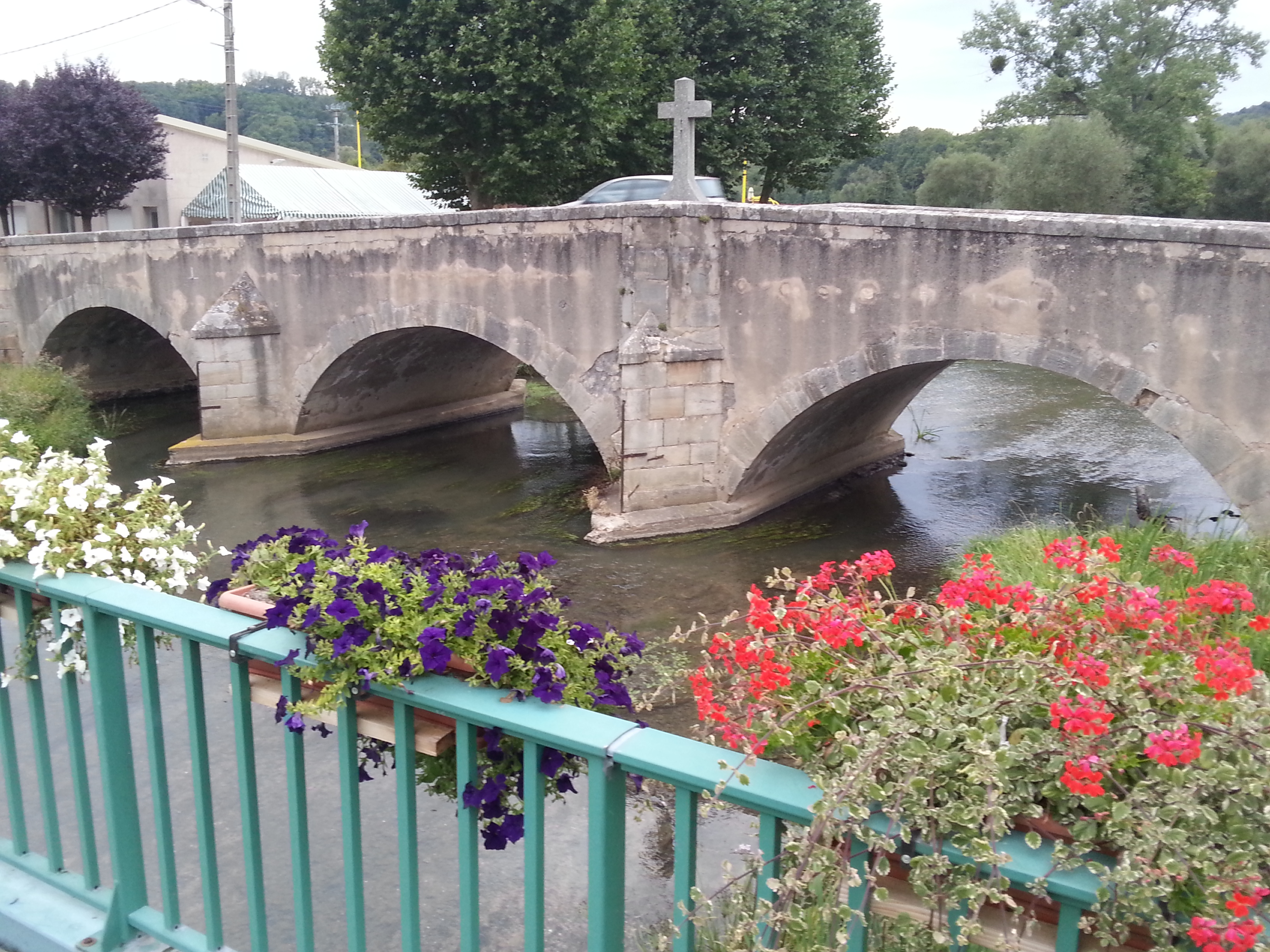 Pont sur le Sanon This photo was uploaded with Wiki Loves Monuments mobile 1.2 (Android).